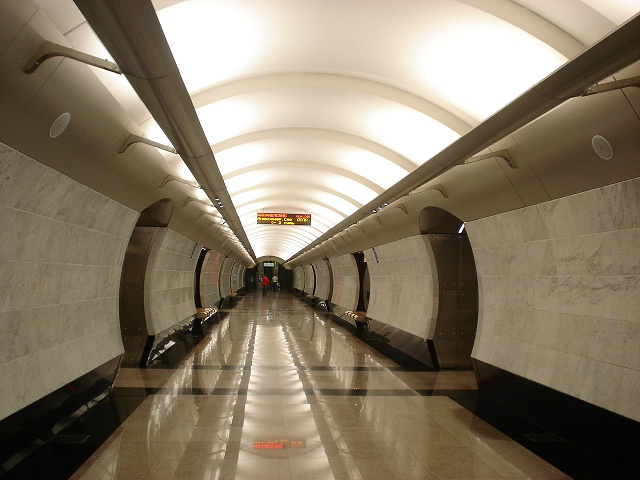 Mezhdunarodnaya Metro Station in Moscow